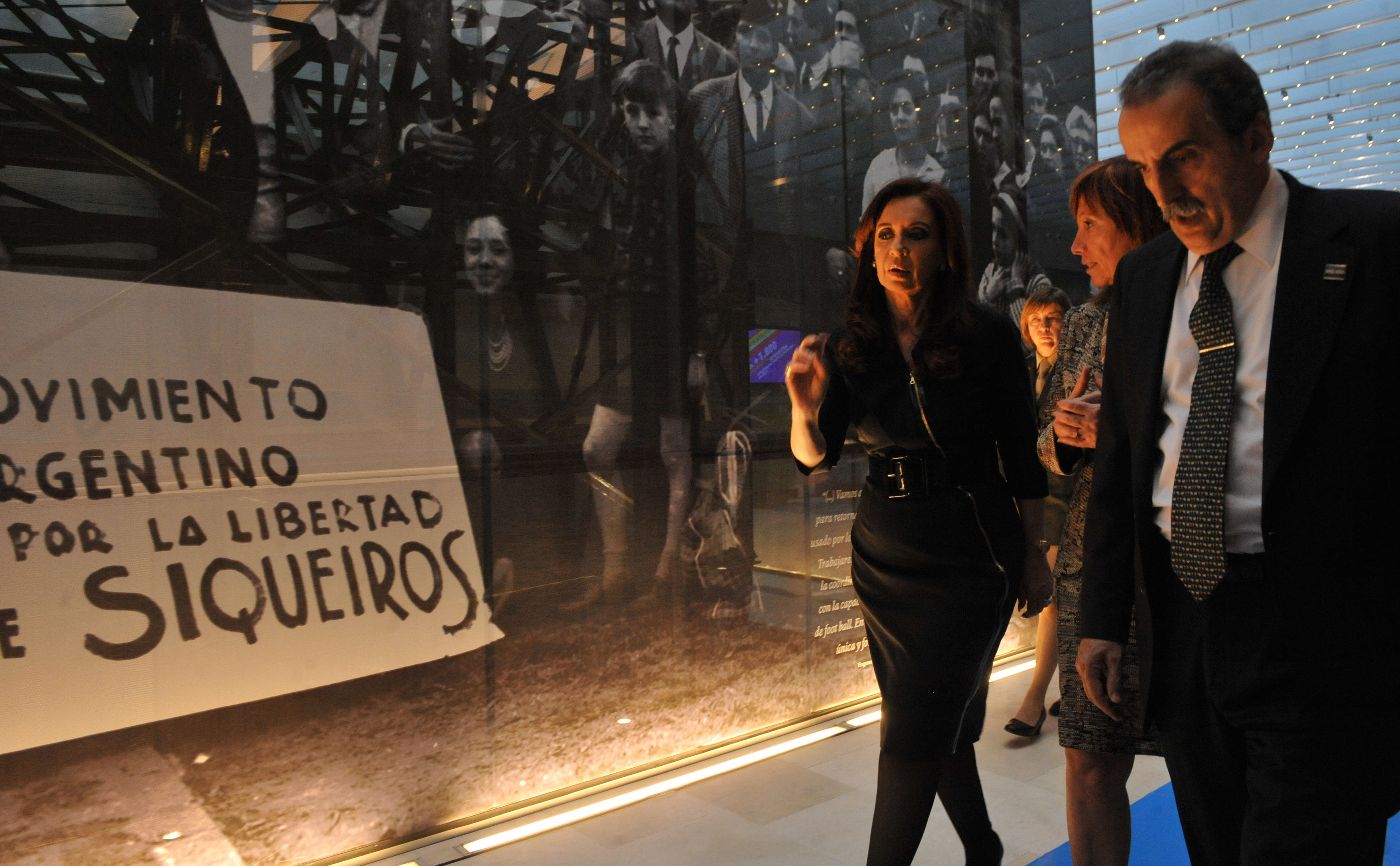 La presidenta Cristina Fernández recorre el Museo del Bicentenario, junto a la titular del INCAA, Liliana Mazure, y al secretario de Comercio, Guillermo Moreno.